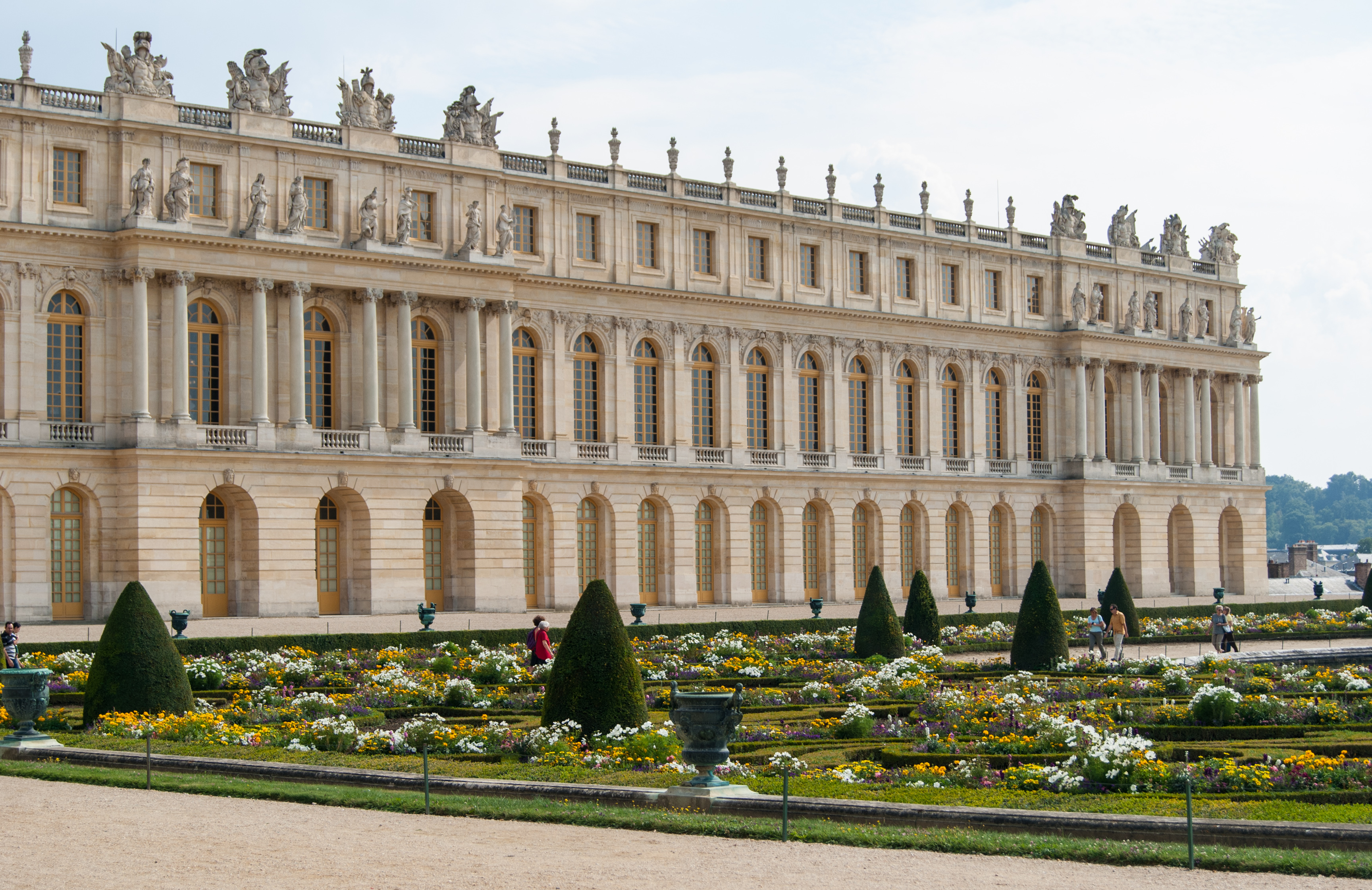 Palace of Versailles, France.